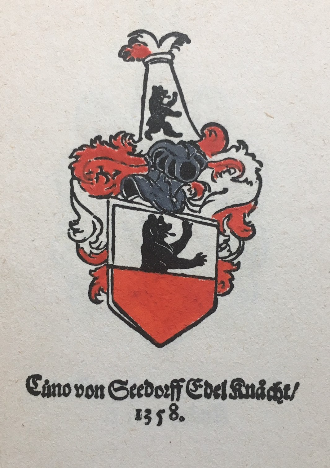 Waltter, Cuno von Seedorf